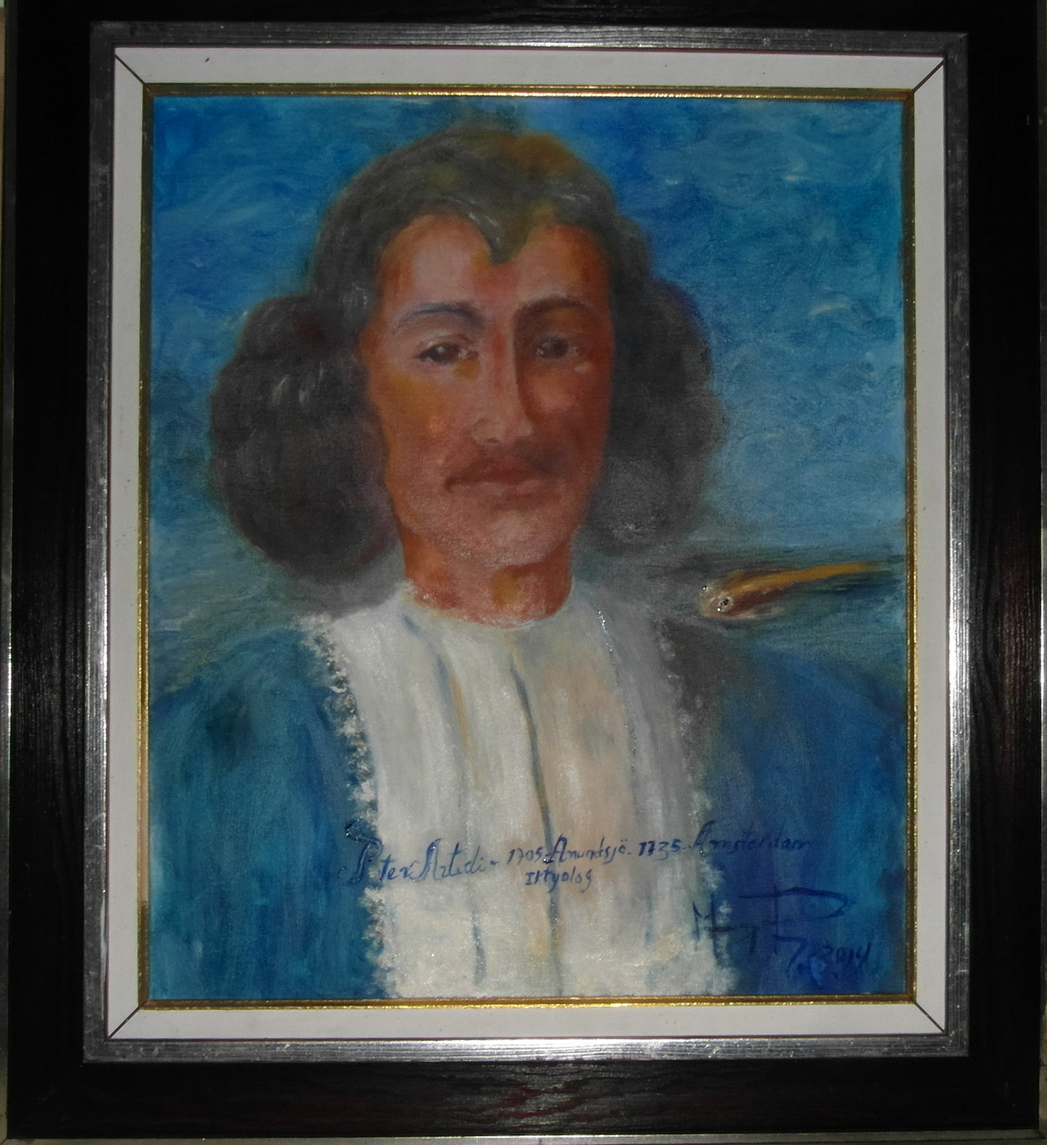 Peter Artedi, en målning av den svensk-venezolanska konstnären Mary Pinzón.